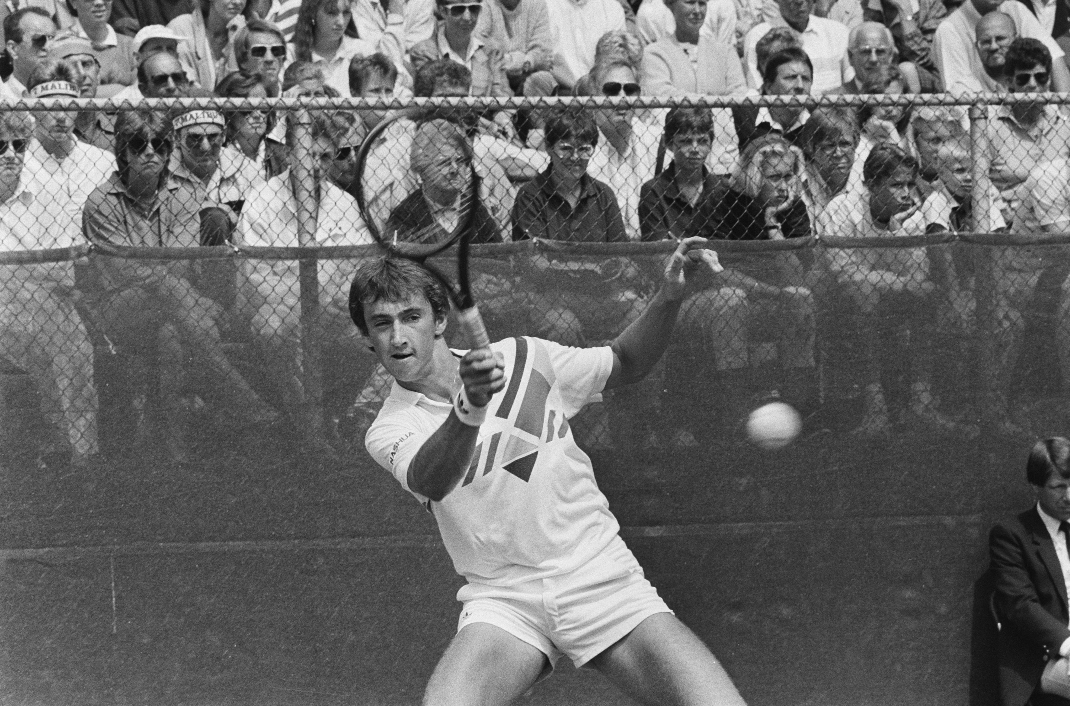 Collectie / Archief : Fotocollectie Anefo Reportage / Serie : [ onbekend ] Beschrijving : Internationale kampioenschap tennis Melkhuisje; Menno Oosting in actie Datum : 30 juli 1986 Trefwoorden : KAMPIOENSCHAPPEN, TENNIS Instellingsnaam : Melkhuisje, 't Fotograaf : Bogaerts, Rob / Anefo Auteursrechthebbende : Nationaal Archief Materiaalsoort : Negatief (zwart/wit) Nummer archiefinventaris : bekijk toegang 2.24.01.05 Bestanddeelnummer : 933-7188